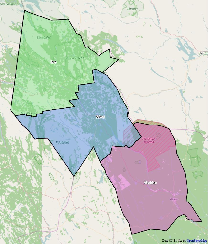 Distriktsindelningen i Älvdalens kommun World file 308.43843345971504277 0 0 -308.43843345971504277 1337636.0574877227190882 8936105.84750803746283054